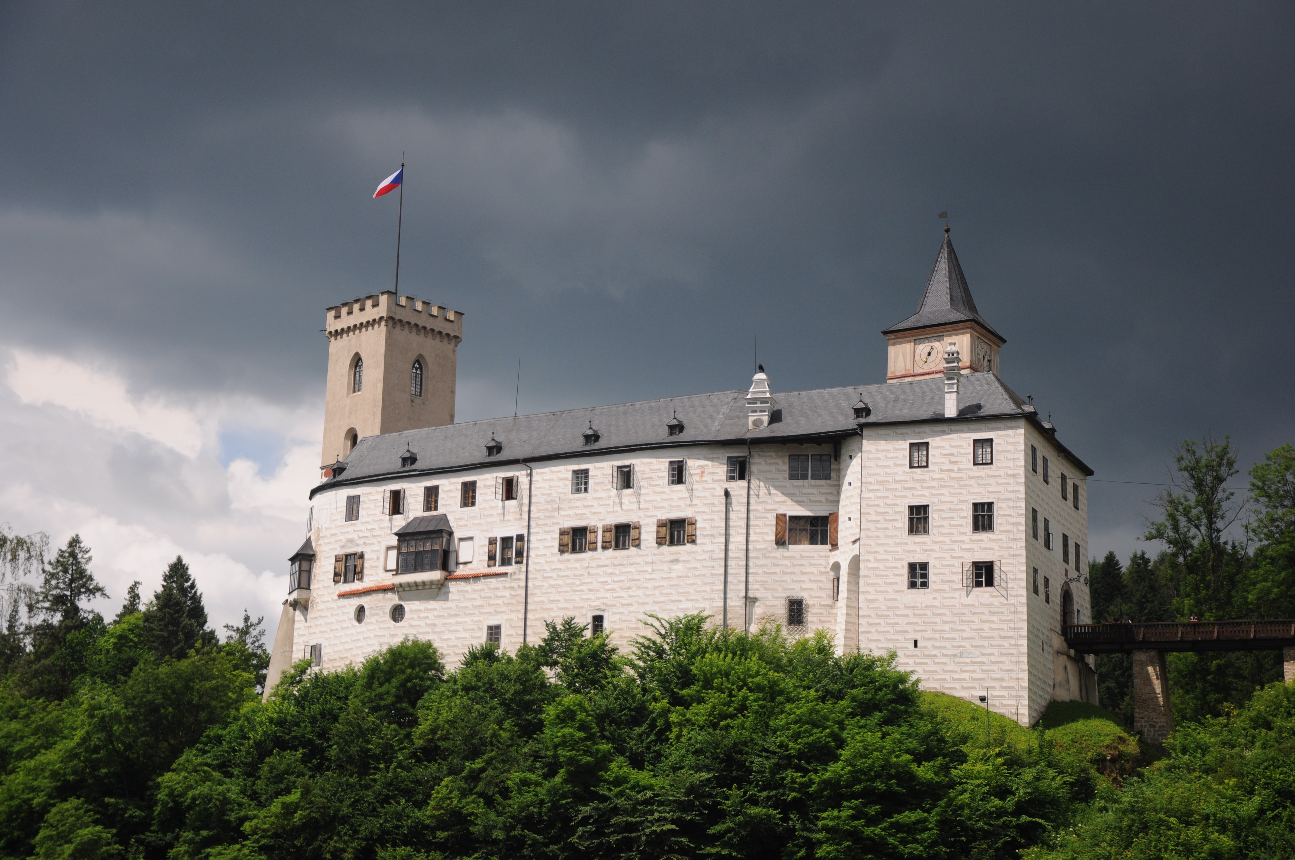 Hrad Rožmberk, Rožmberk nad Vltavou 66, 67, 68, 105, 111, Rožmberk nad Vltavou.